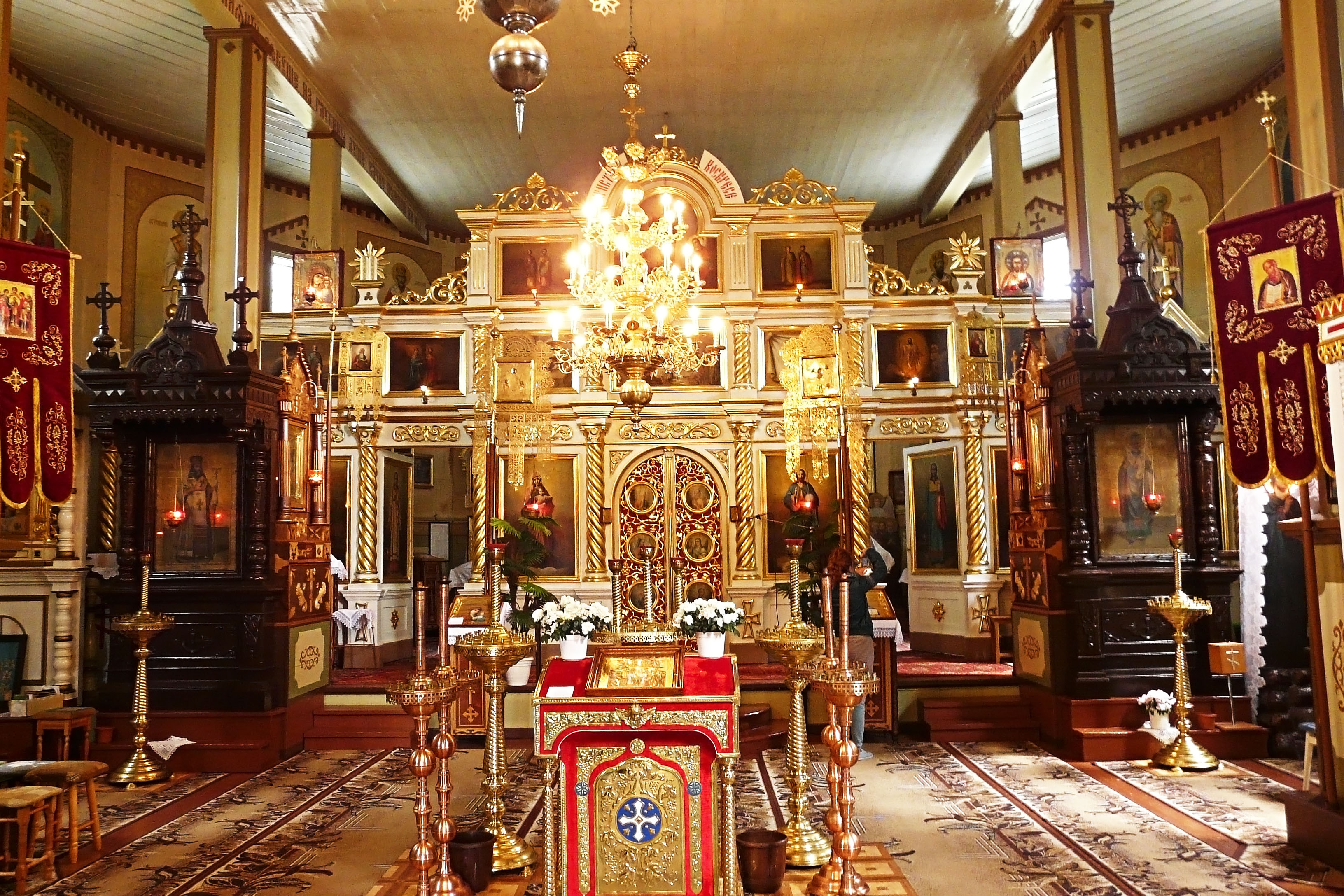 Cerkiew gr.-kat., ob. prawosławna par. p.w. św. Michała, drewn., 1797, przebud. 1879 Orla, Orla 10.1966.